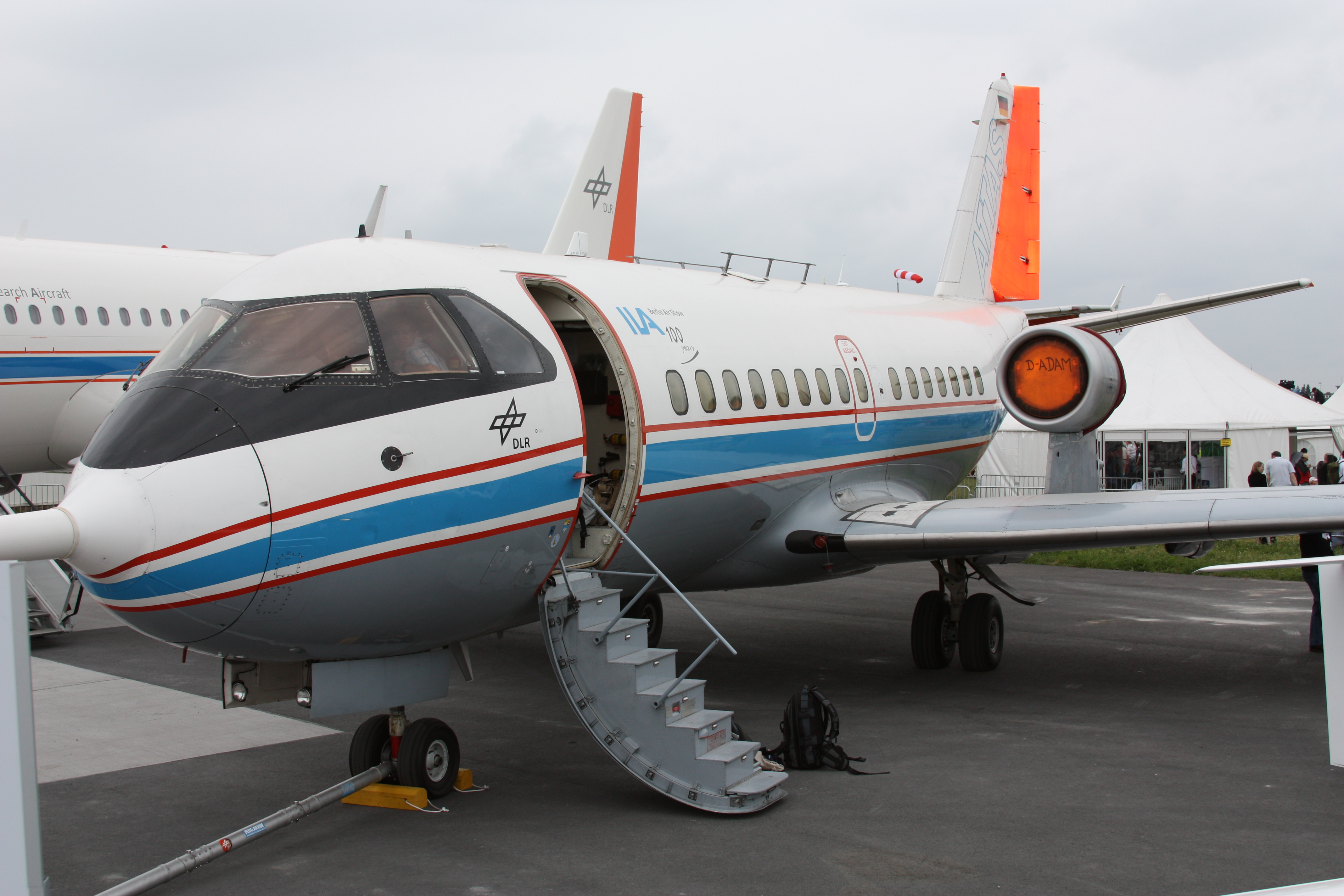 ILA 2010, am Samstag aufgenommen, meist erhöht von einer Leiter fotografiert